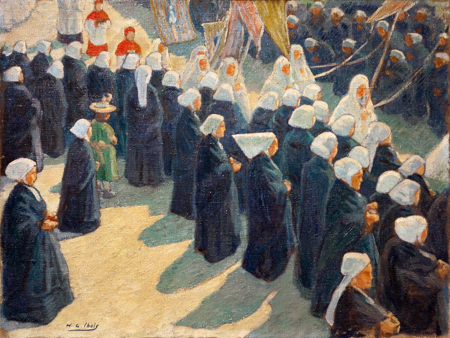 La procession